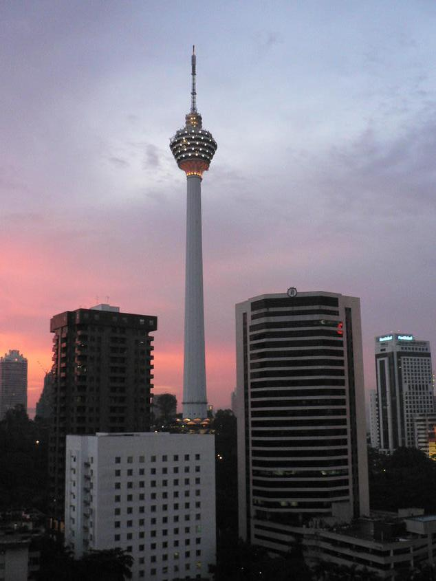 Coucher de soleil sur Menara Kuala Lumpur, Malaisie, Juin 2006.